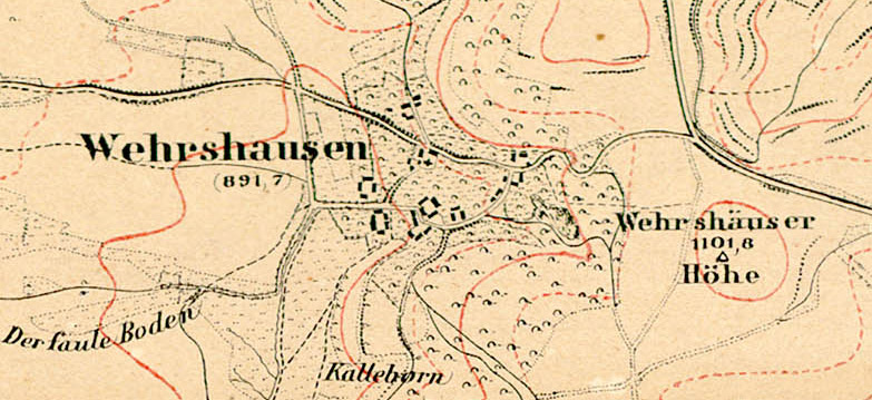 Topografische Karte von Wehrshausen bei Marburg (1:25000).